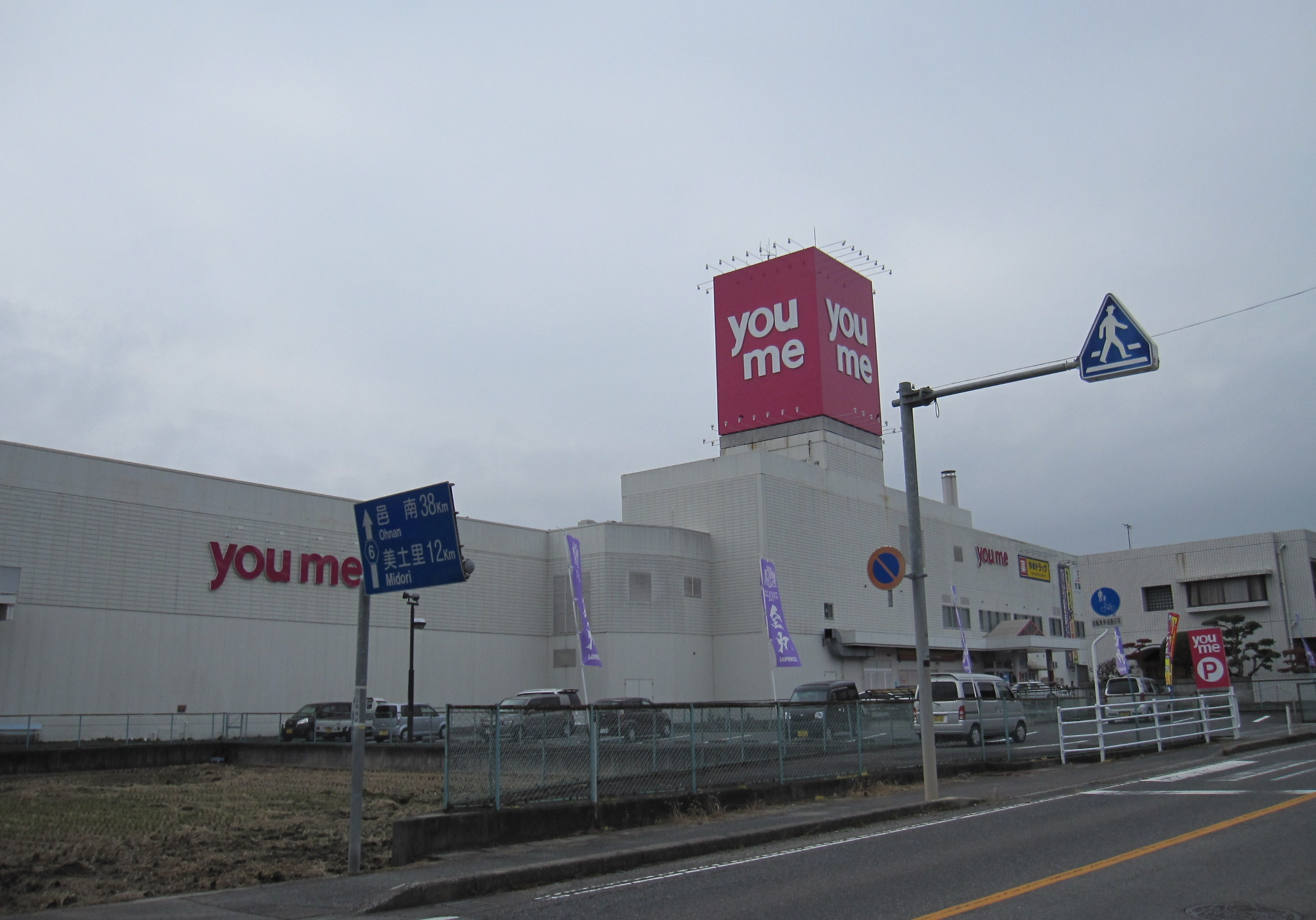 ゆめタウン吉田